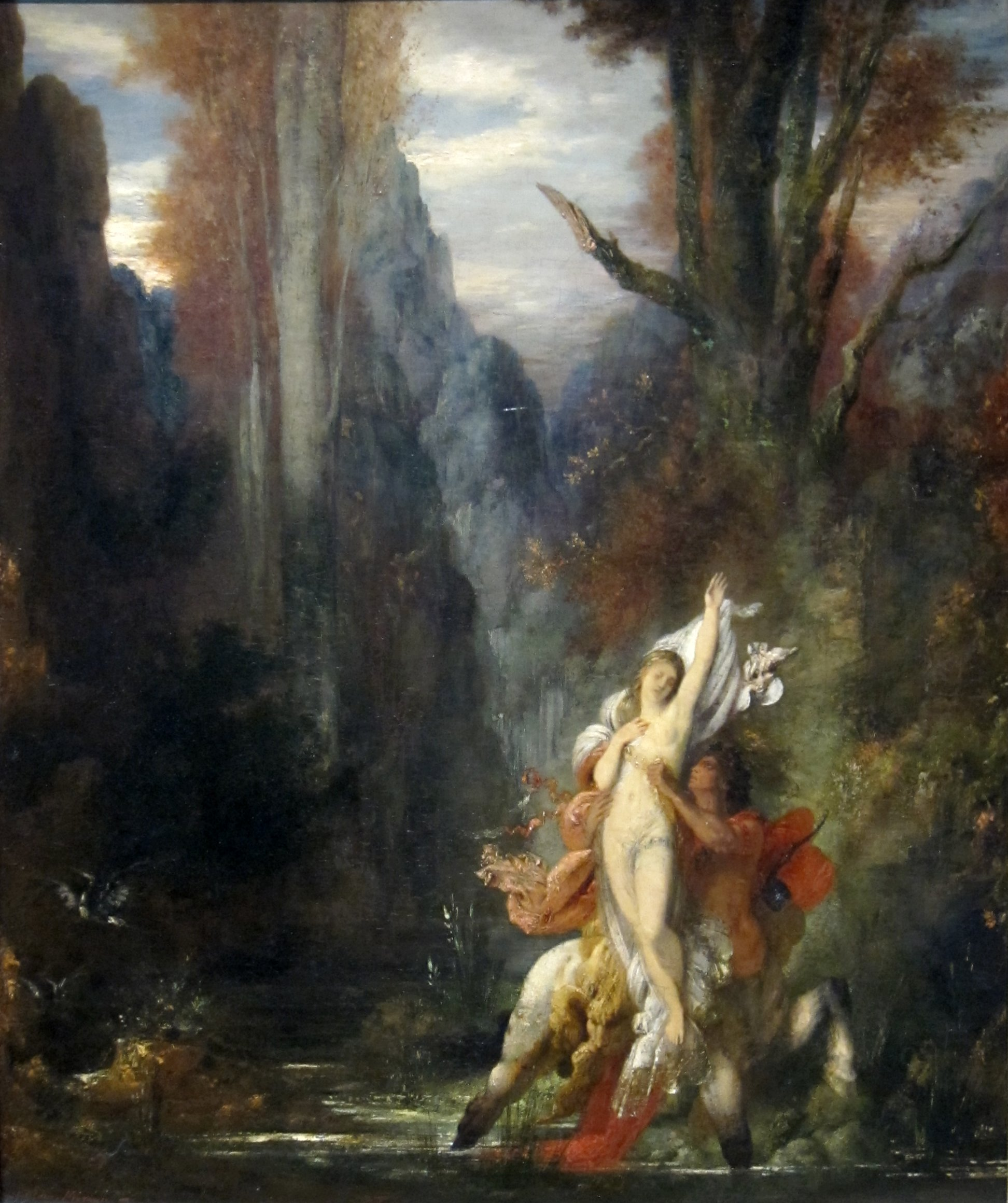 Autumn (Dejanira)label QS:Len,"Autumn (Dejanira)"